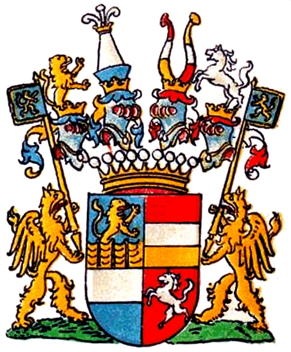 Wappen derer von Paumgarten